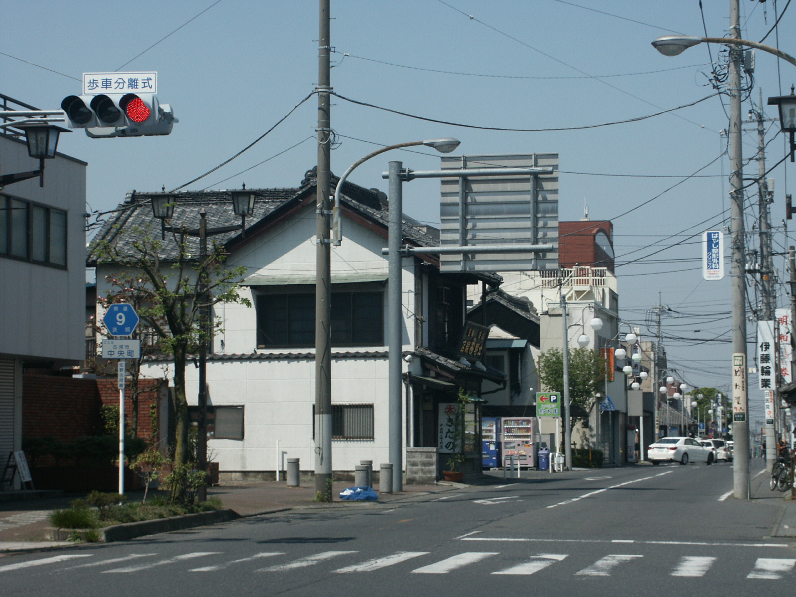 茨城県道9号線古河市中央町付近（三国橋方面を撮影）